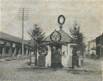 Ильинская часовня на рыночной площади в Перми в 1896 г. во время торжеств по случаю 500-летия со дня кончины Святителя Стефана Пермского